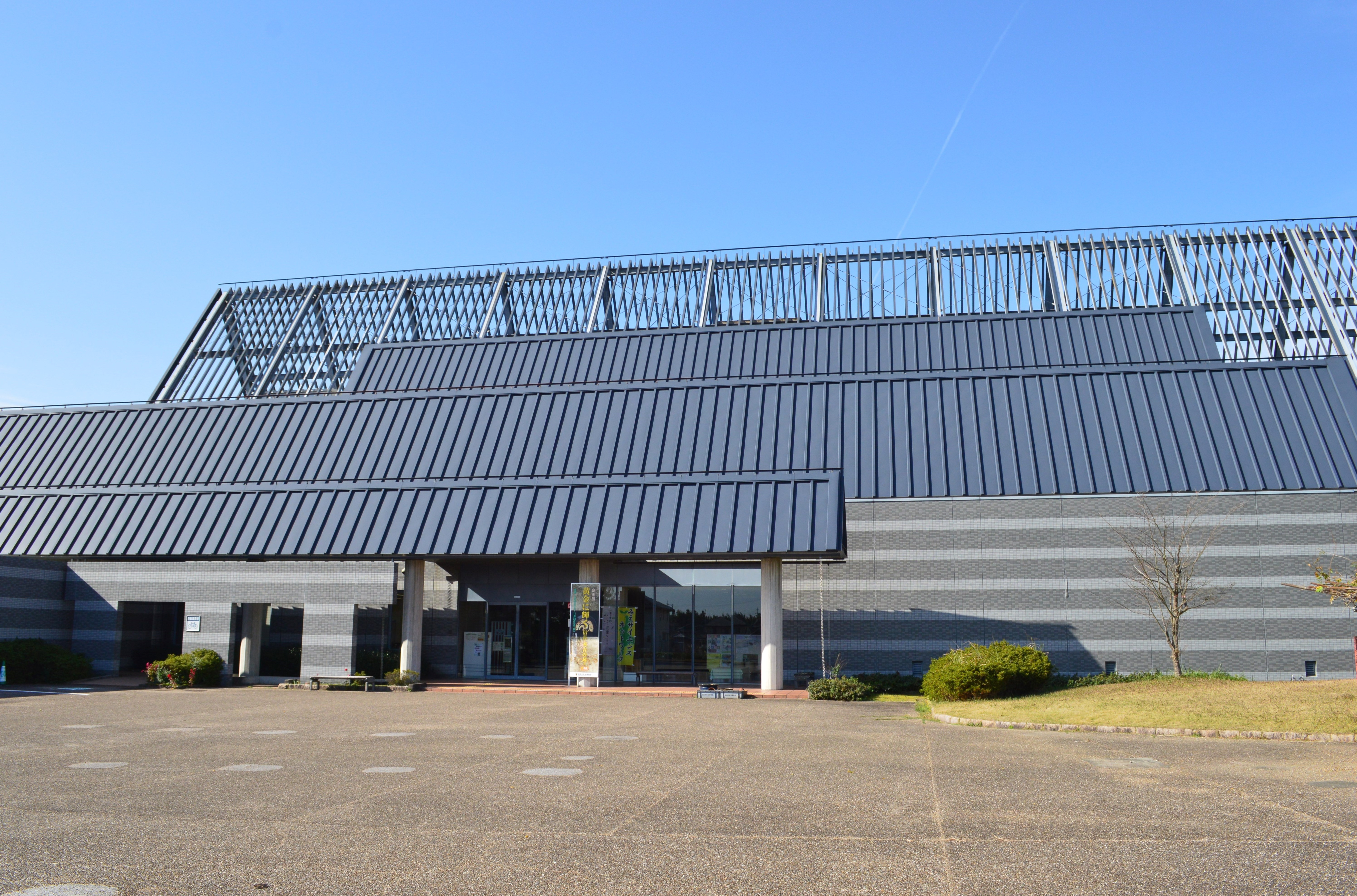 鈴鹿考古博物館 概観